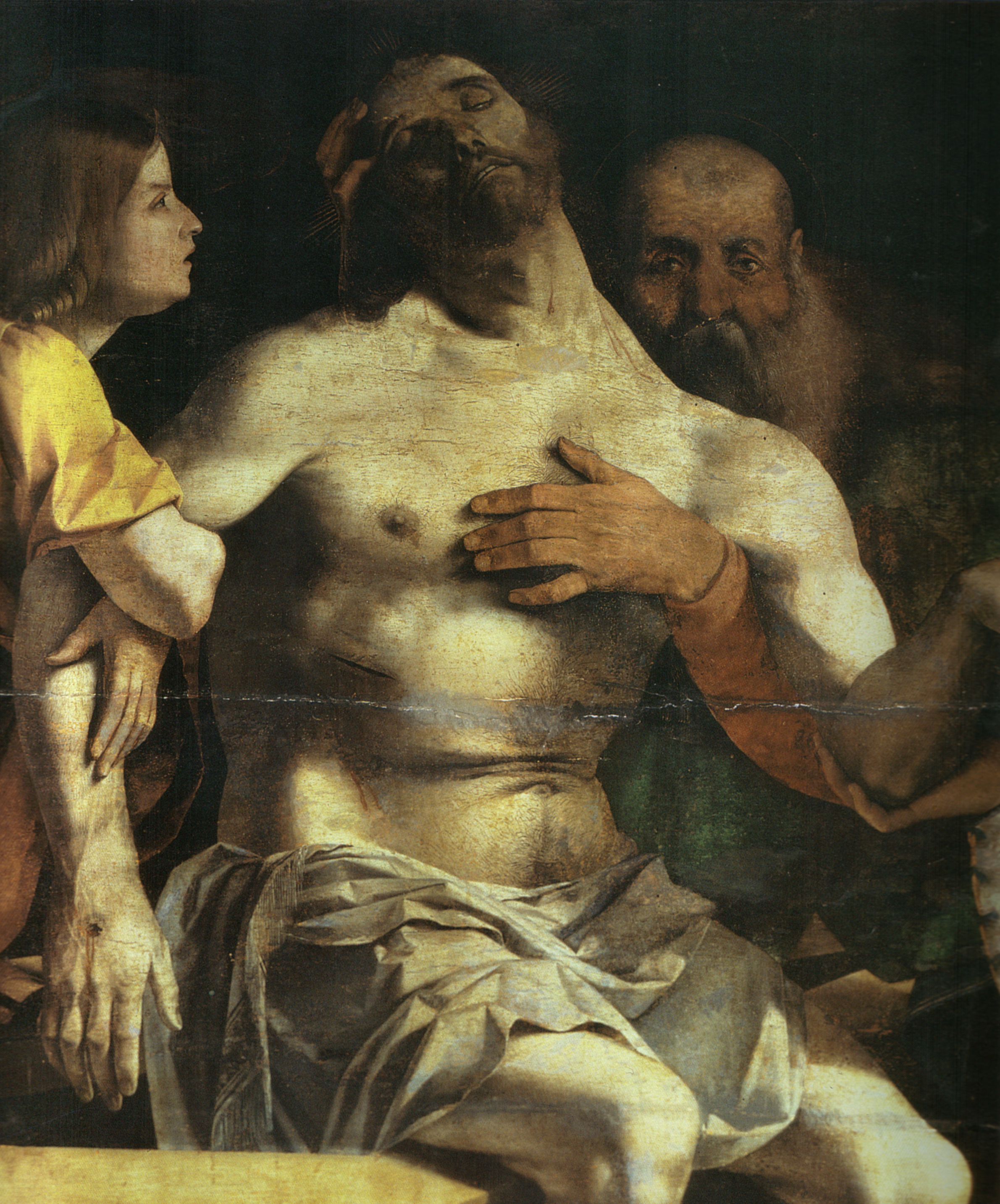 detail